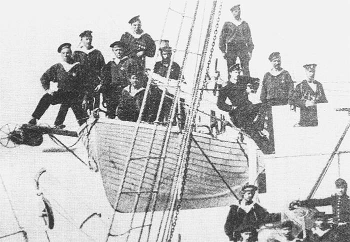 Паровой катер "Сухум", парохода "Великий князь Константин".